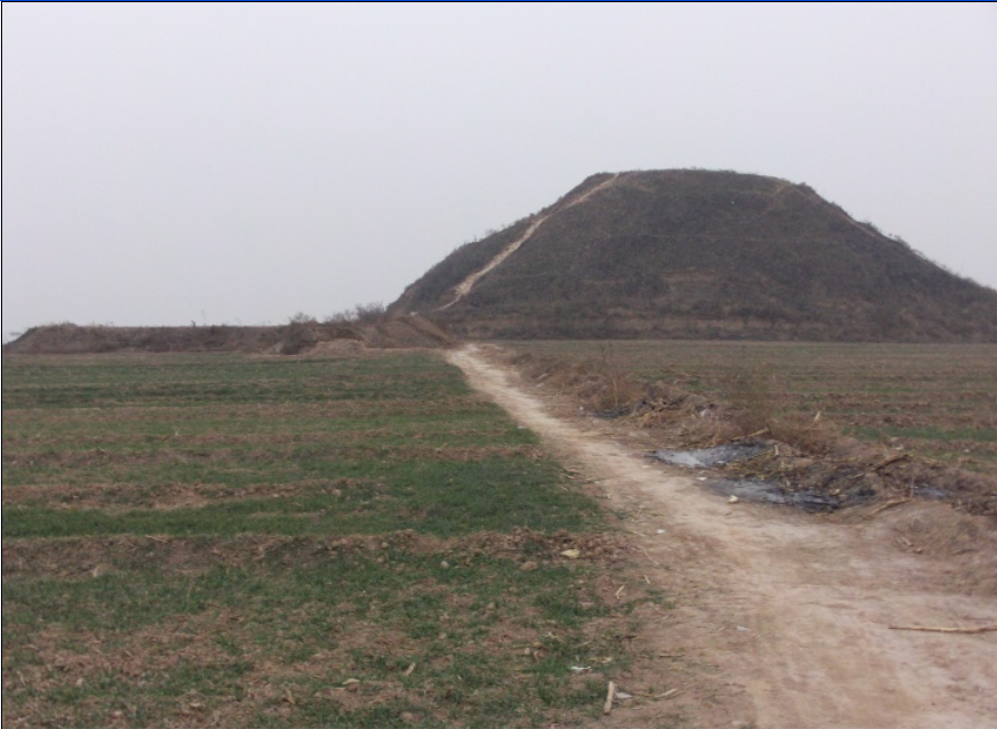 位于汉武帝茂陵陪葬墓最东端